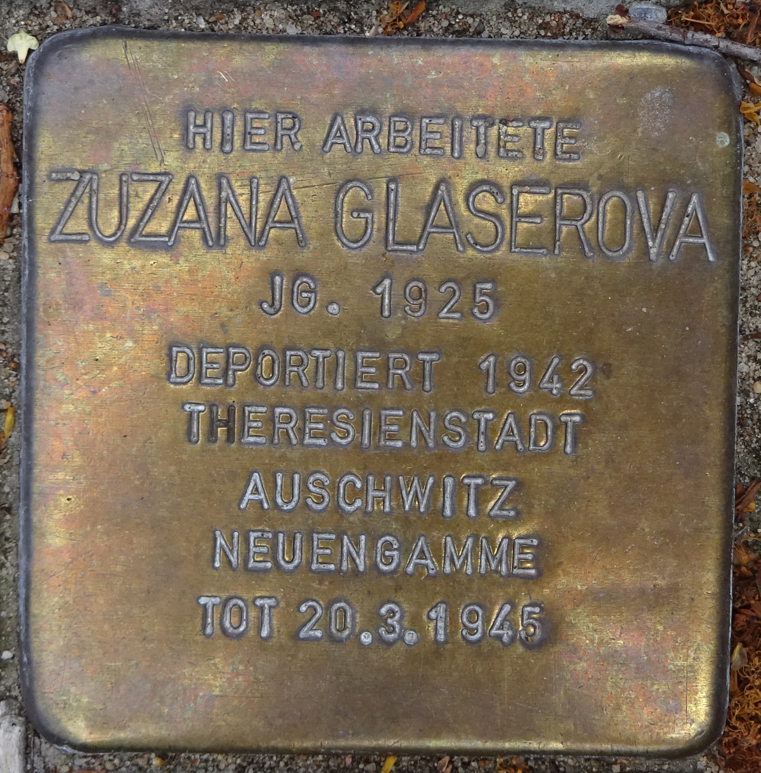 Stolperstein für Zuzana Glaserova